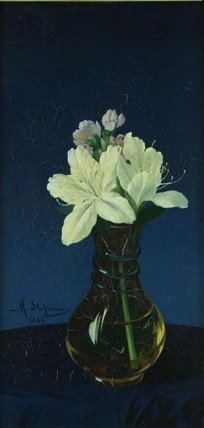 Mihail Ştefănescu (1845-1900) - Flori, ulei pe carton, Muzeul Naţional de Artă al României, Bucureşti